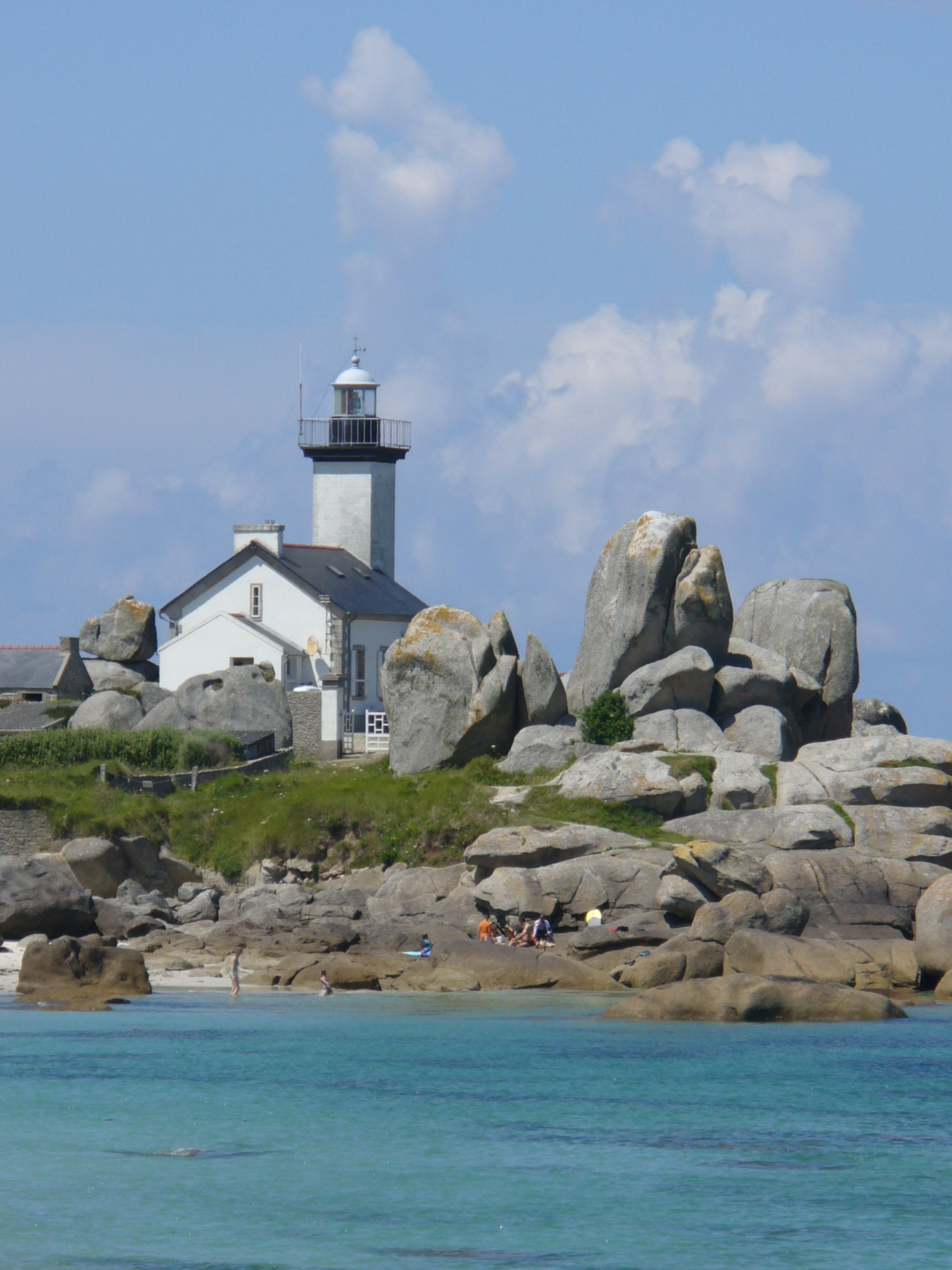 Phare de Pontusval - Leuchtturm von Pontusval erbaut zwischen 1865-1869-Landsspitze Beg-Pol.Seine erste Zündung fand am 15.September 1869 statt. Höhe-14,5 Meter, Reichweite 10 Nautische Seemeilen-Verbindungsglied zwischen dem Leuchtturm auf der Insel Jungfrau und der Leuchtturm auf der Insel Batz. Brignogan-Plages, Finistère ,Côte des Légendes